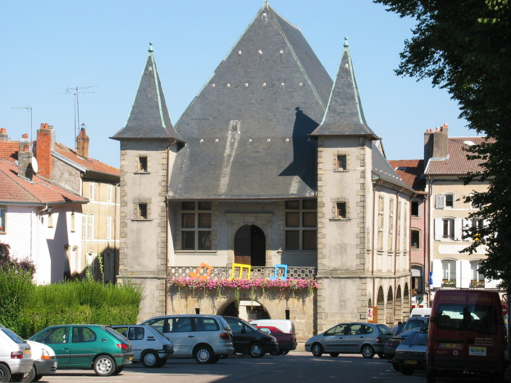 Mirecourt (France, département de Vosges) ancienne halle.